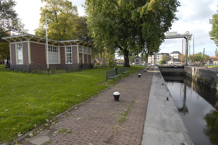 Het IJsselhuis in Gouda aan de Schielands Hoge Zeedijk. Naast de Mallegatsluis